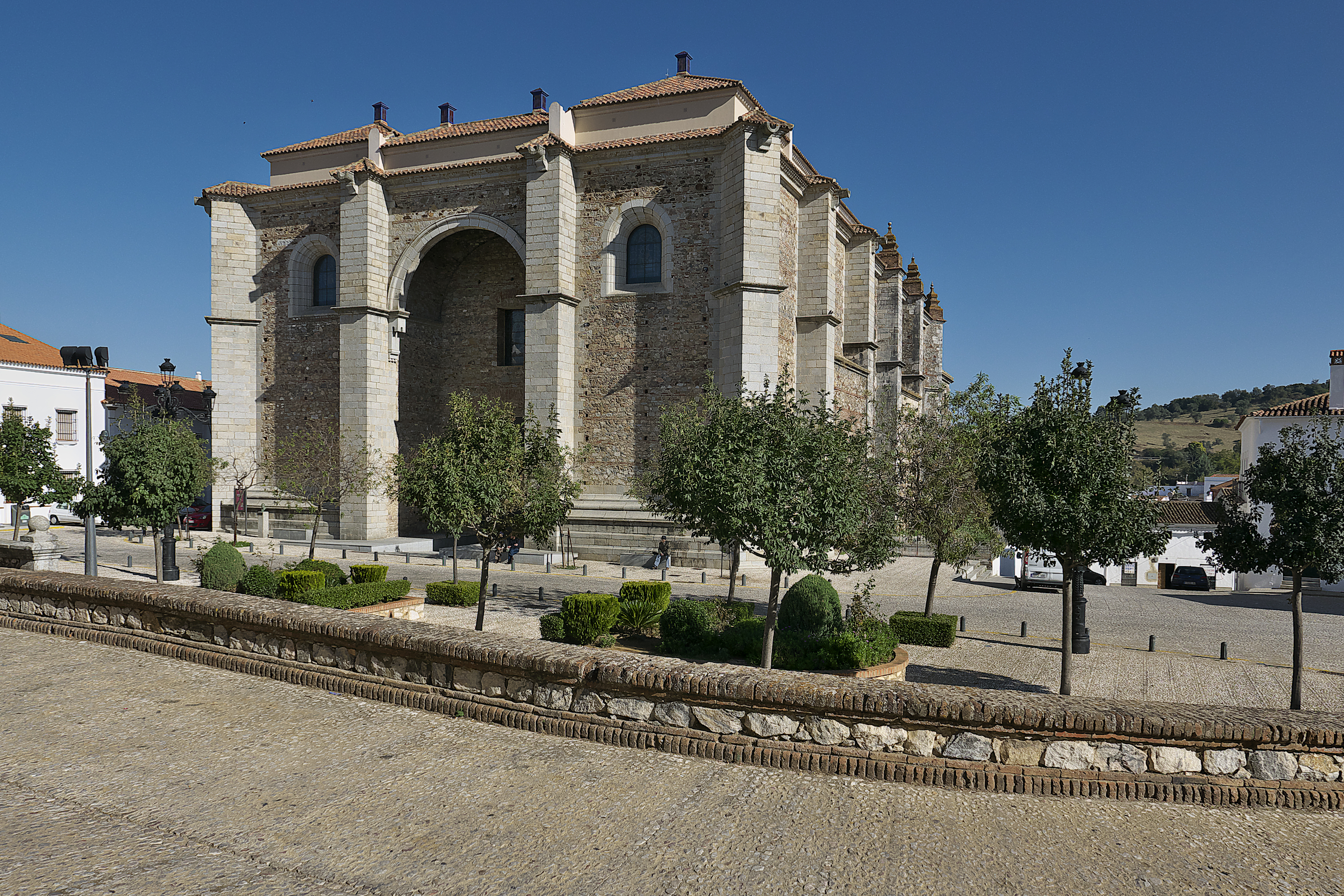 Comenzada por Diego de Riaño y terminada por Antonio de Figueroa. Otros maestros mayores, Hernán Ruiz II y Pedro de Silva.